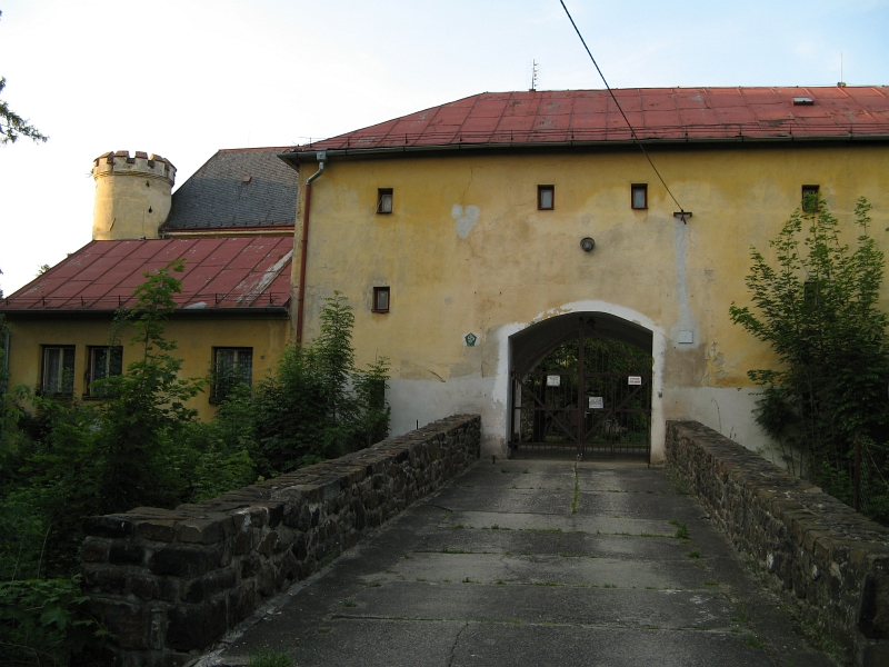 Zámek Dívčí Hrad, Dívčí Hrad 56